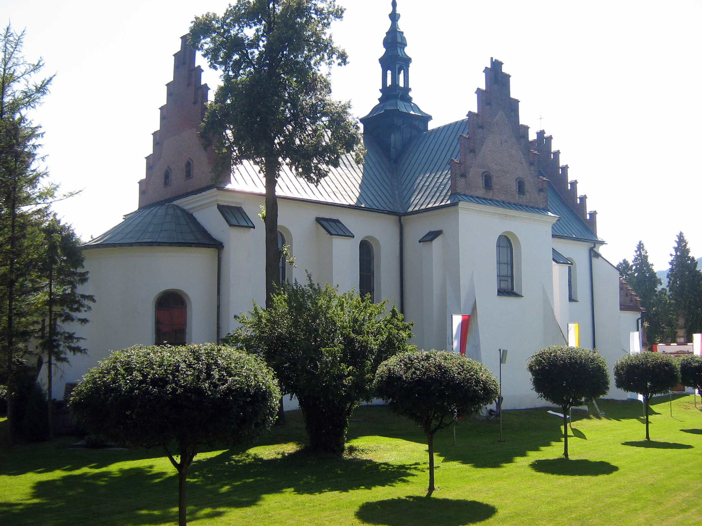 Opactwo w Szczyrzycu, 2010 r.